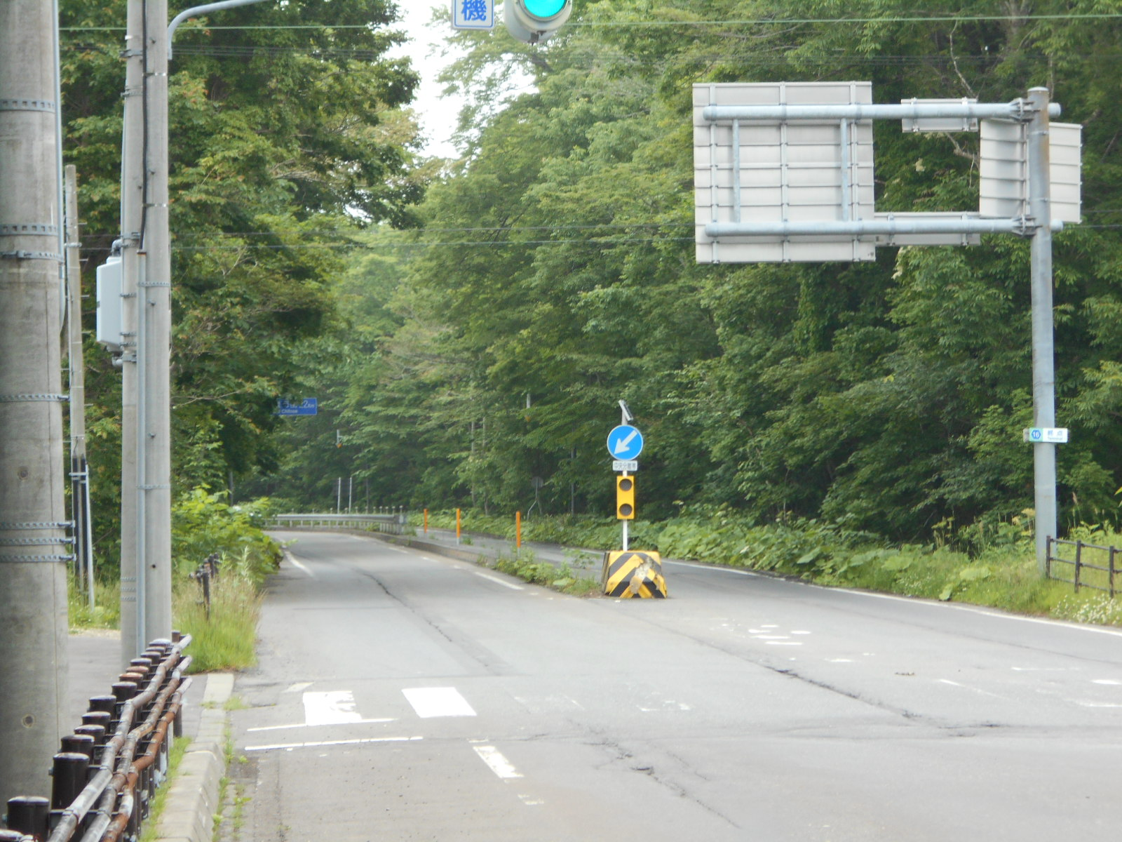 北海道道16号支笏湖公園線終点